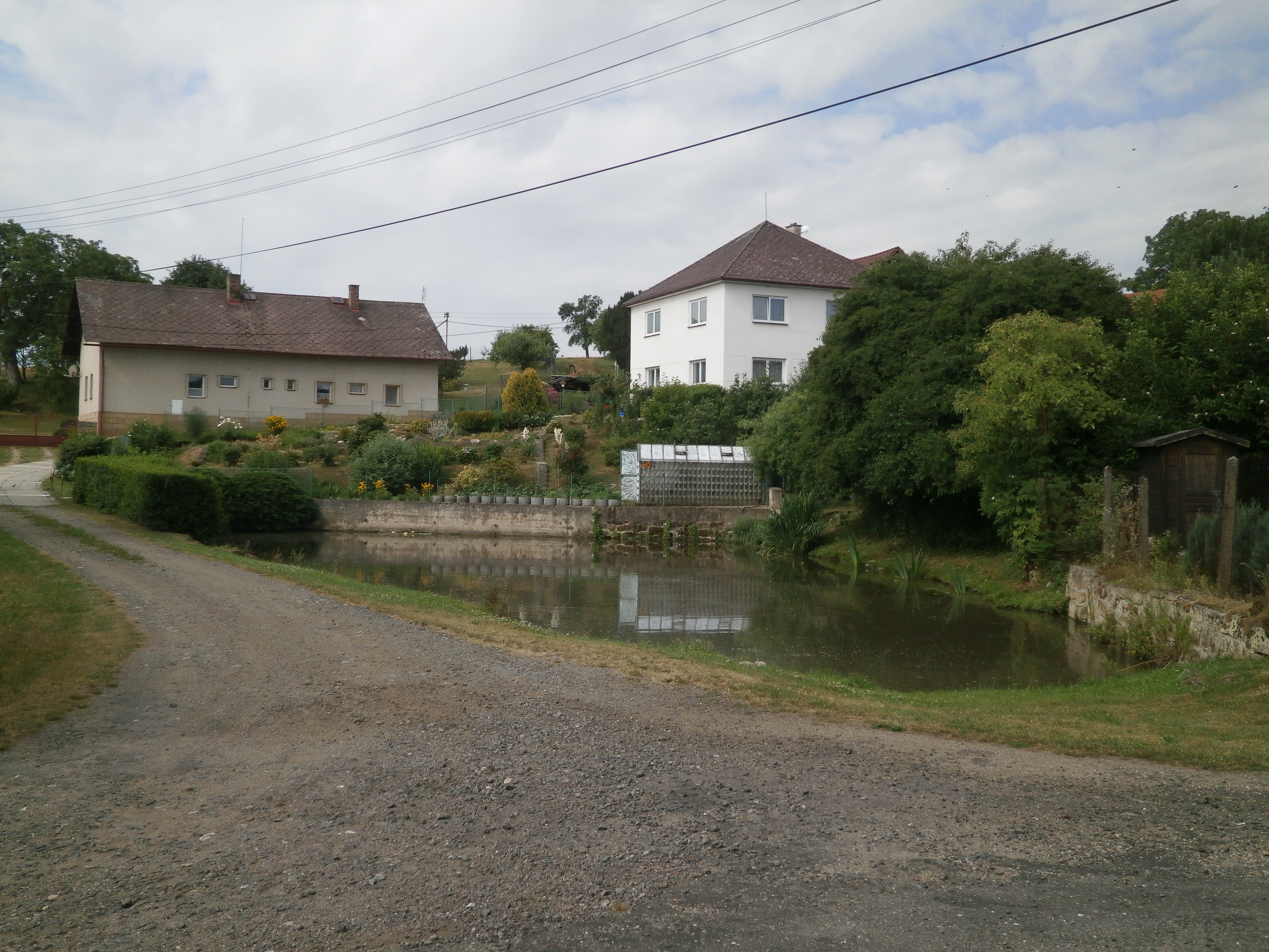 Ošťovice - střed obce, č.p. 8 a 9